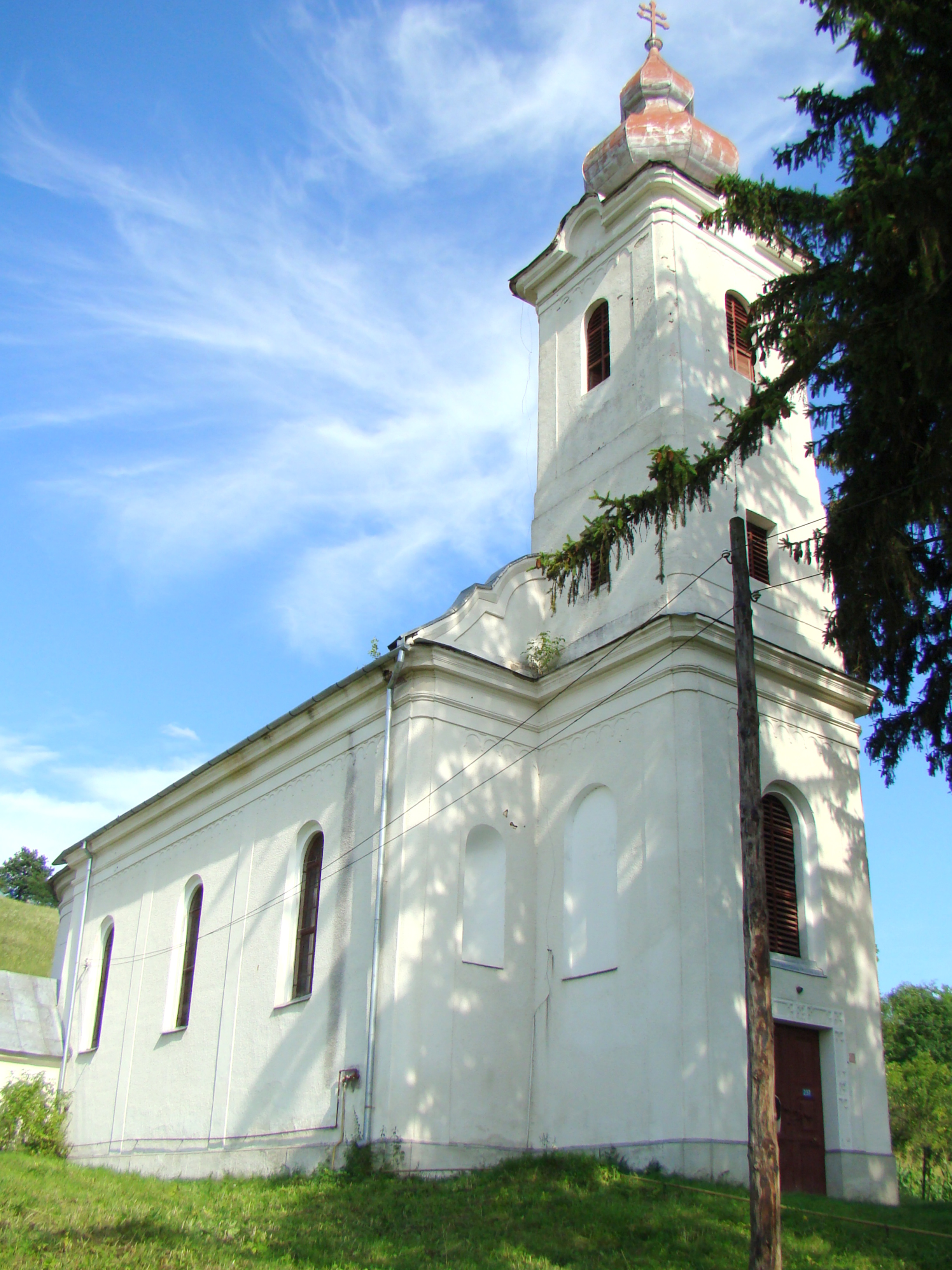 Roman Catholic church in Nușeni (Apanagyfalu), Bistrița-Năsăud County, Romania